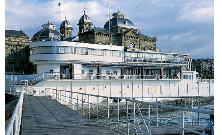 Donostiako Klub Nautikoaren eraikina. Estetika ikusgarria du, Le Corbusierren estiloan oinarritua, badian ainguraturiko itsasontzi bat itxuratzen duela. Aizpurua eta Labaien arkitektoen lana da.